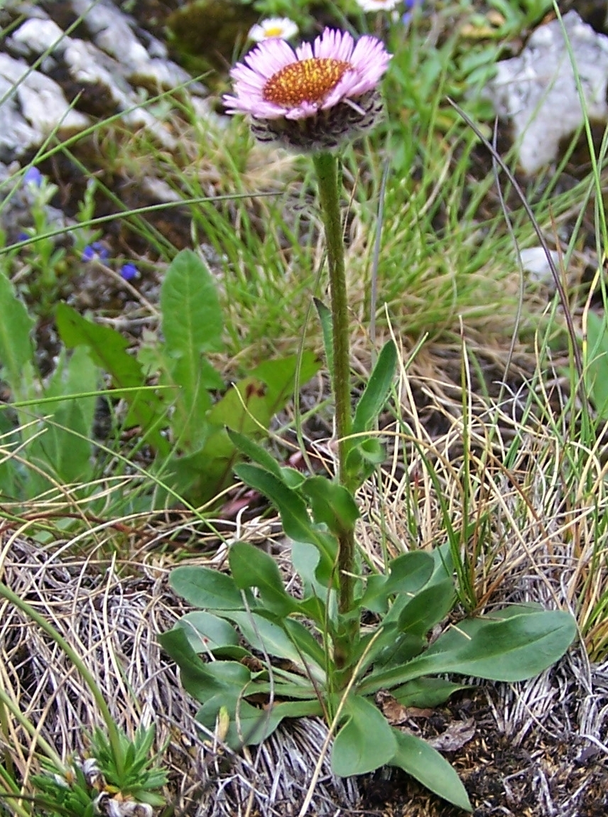 Erigeron uniflorus (pl. przymiotno jednokoszyczkowe), habitat: Tatra Mountains, Hala Upłaz